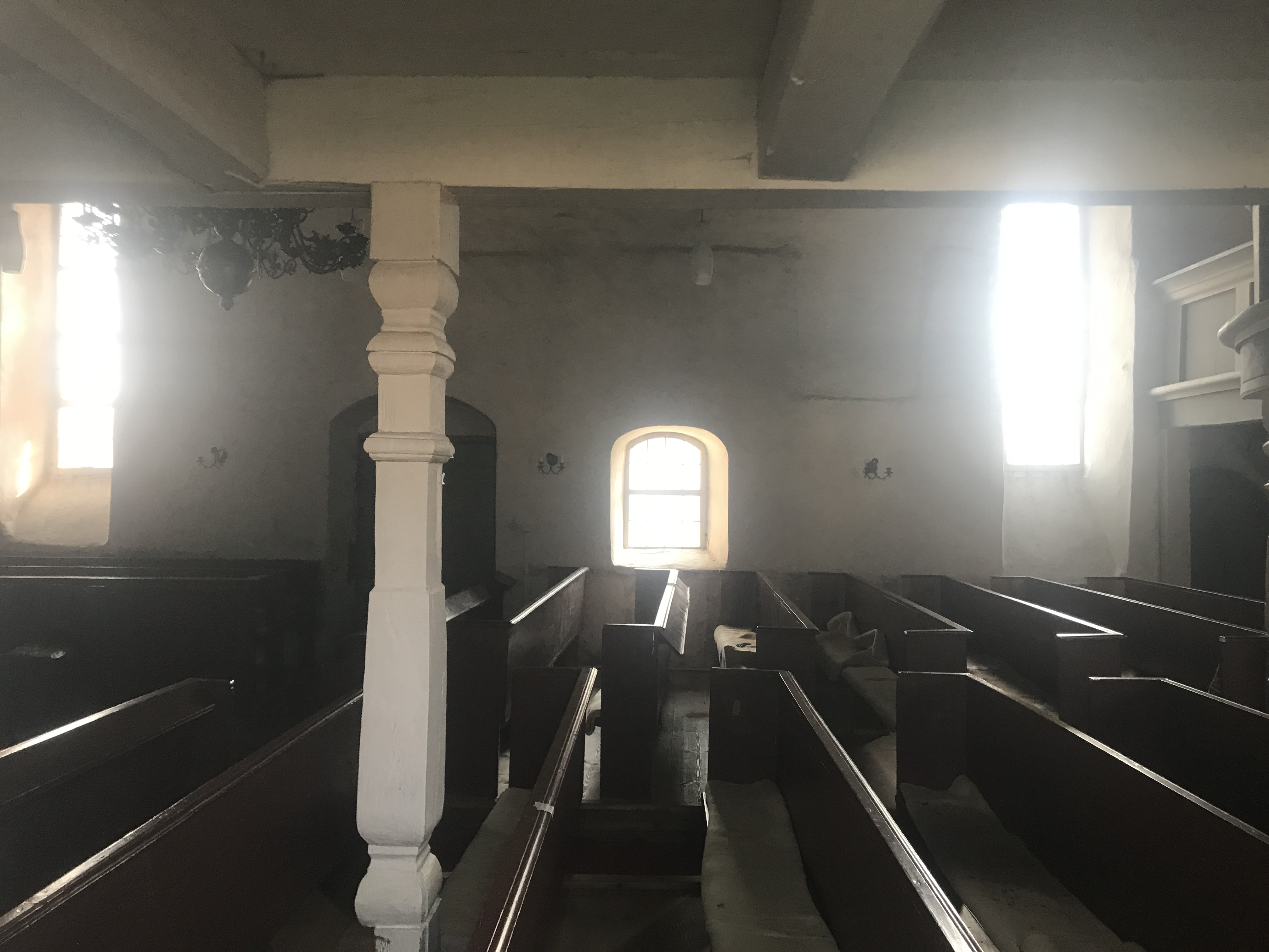 Die Dorfkirche Gießmannsdorf ist eine frühgotische Saalkirche in Gießmannsdorf, einem Ortsteil der Stadt Luckau im Landkreis Dahme-Spreewald im Land Brandenburg. Im Innern steht unter anderem ein spätklassizistischer Kanzelaltar aus der Zeit um 1865.